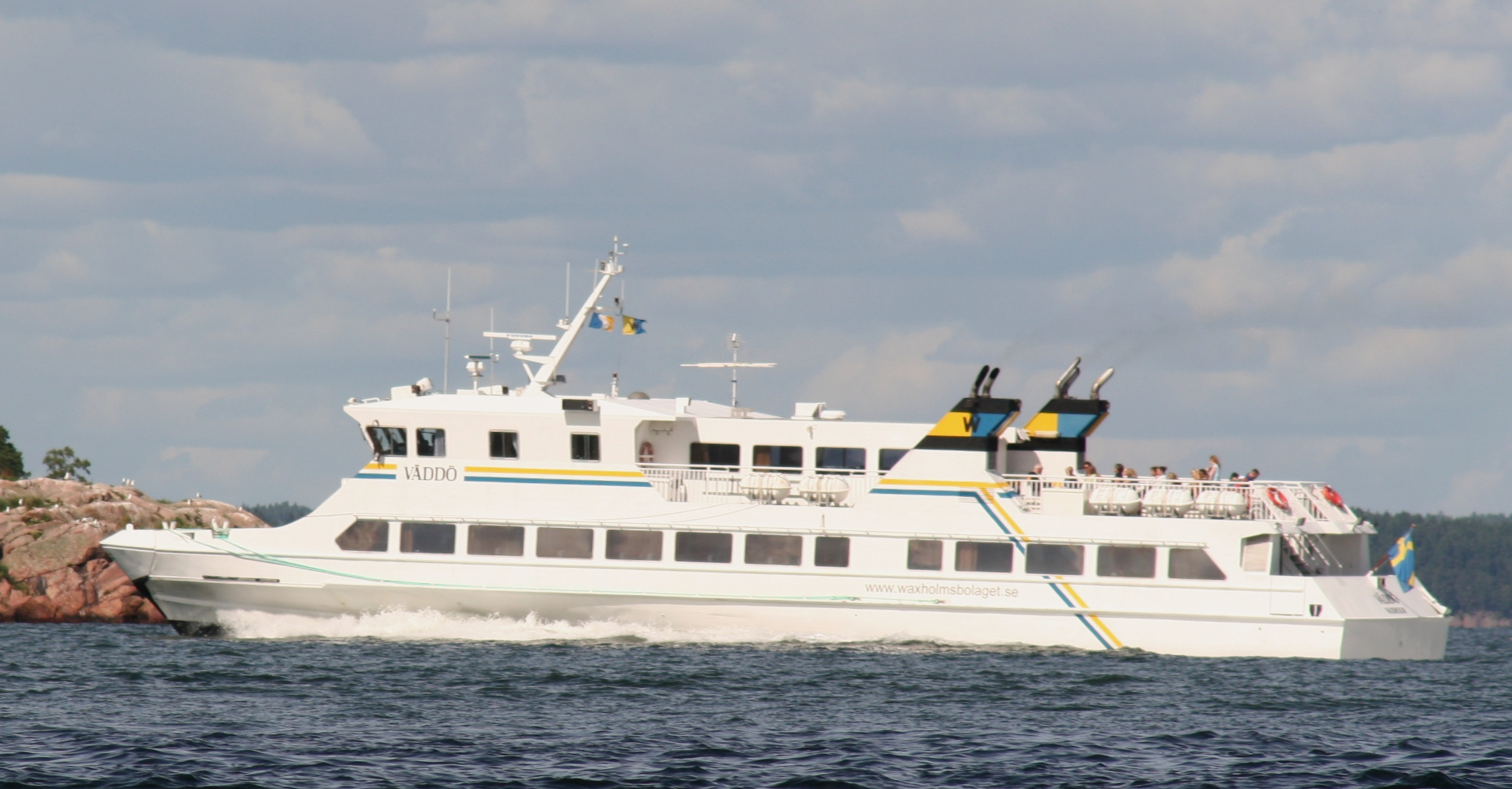 Waxholmsbolagets M/S Väddö på Saxarfjärden i Stockholms skärgård. IMO Number: 9032018 Callsign: SCFR Källa: eget foto, fotograf EnDumEn 30 juli 2007